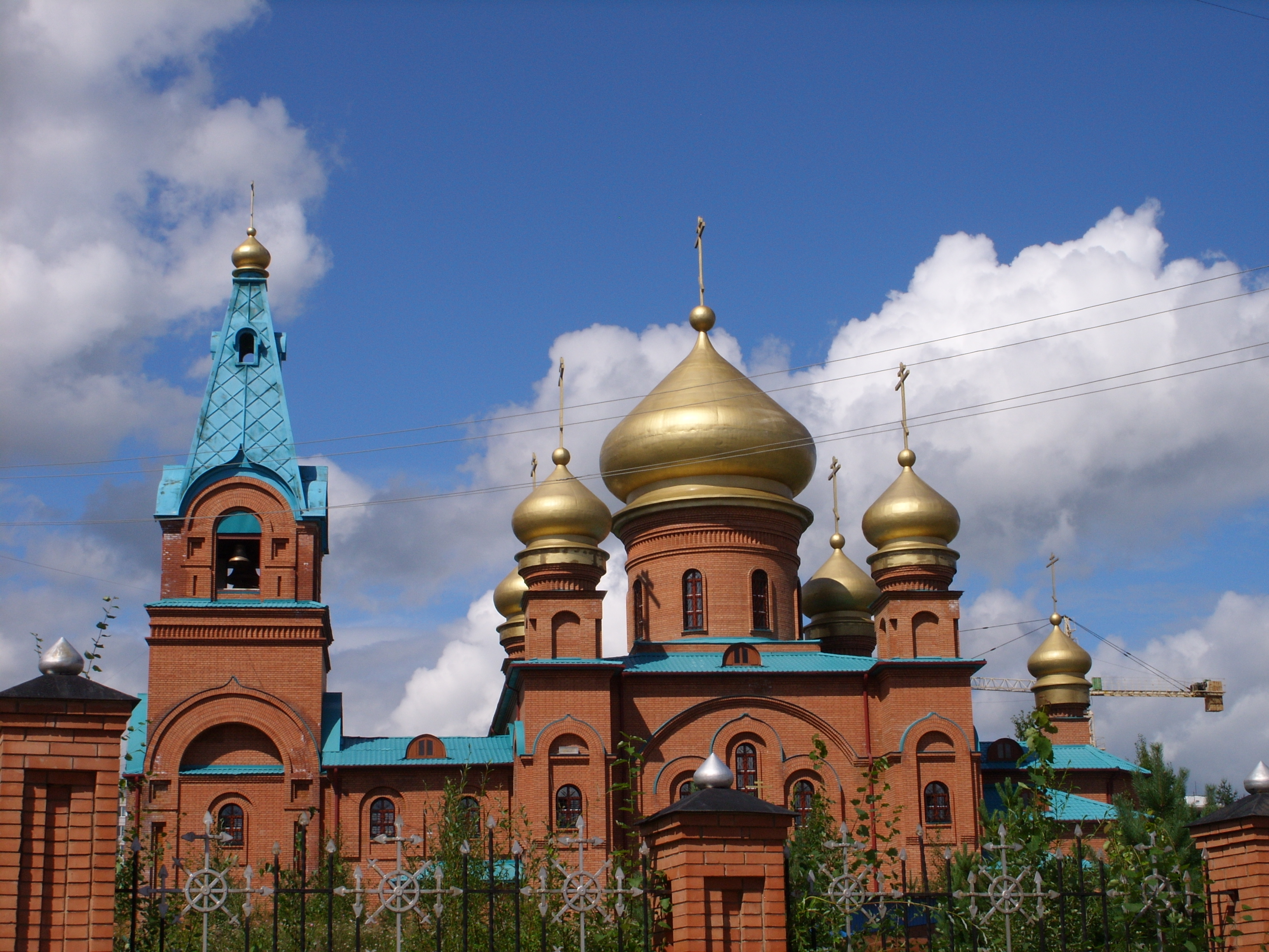 Город Тында летом 2011 года. По дороге в Благовещенск